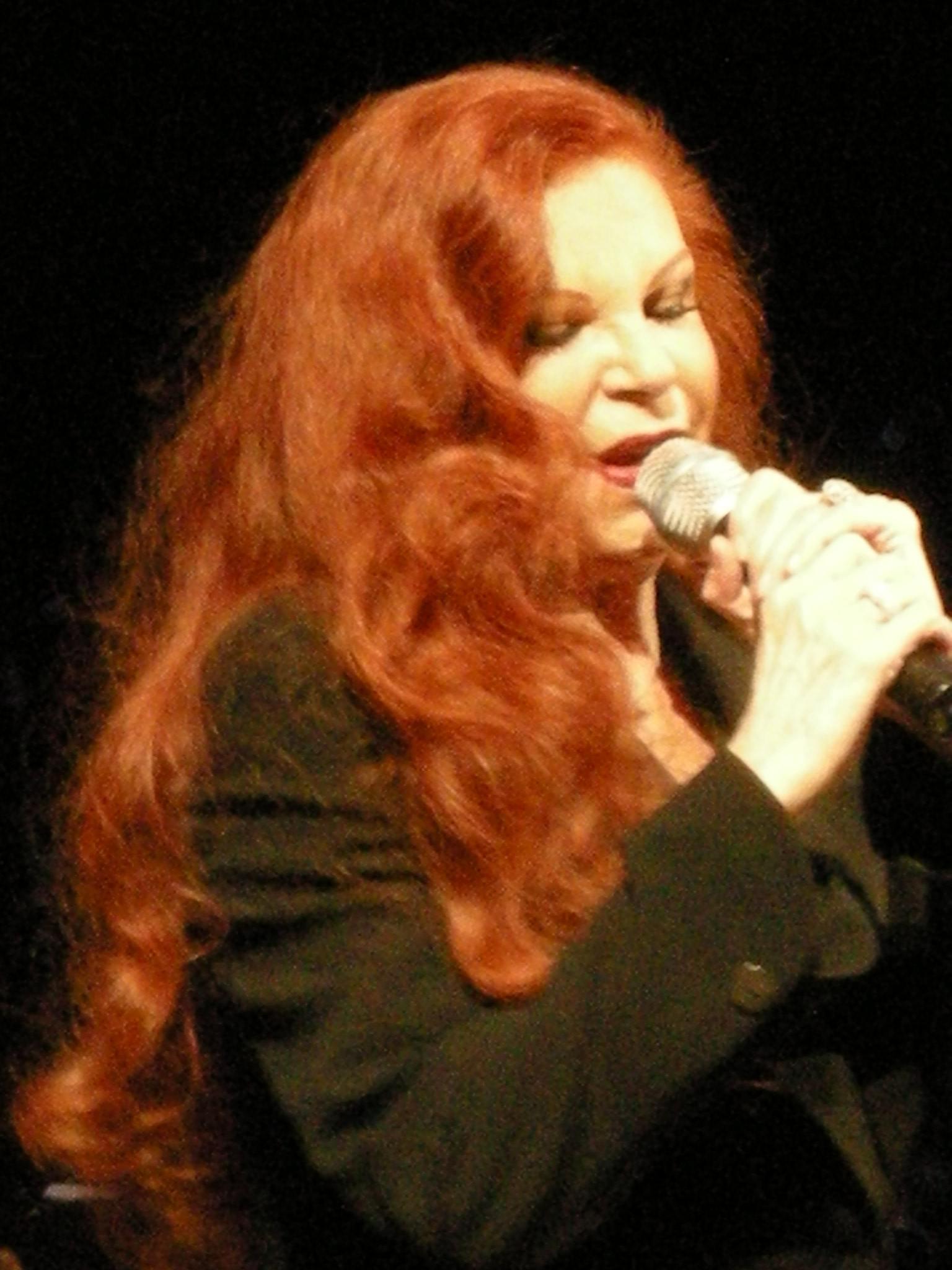 Milva in Pistoia 31-01-09